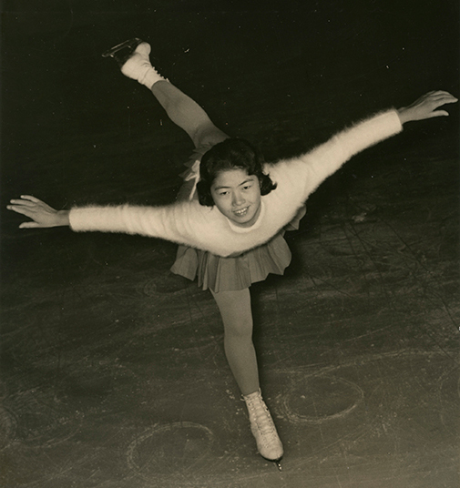 Junko Hiramatsu